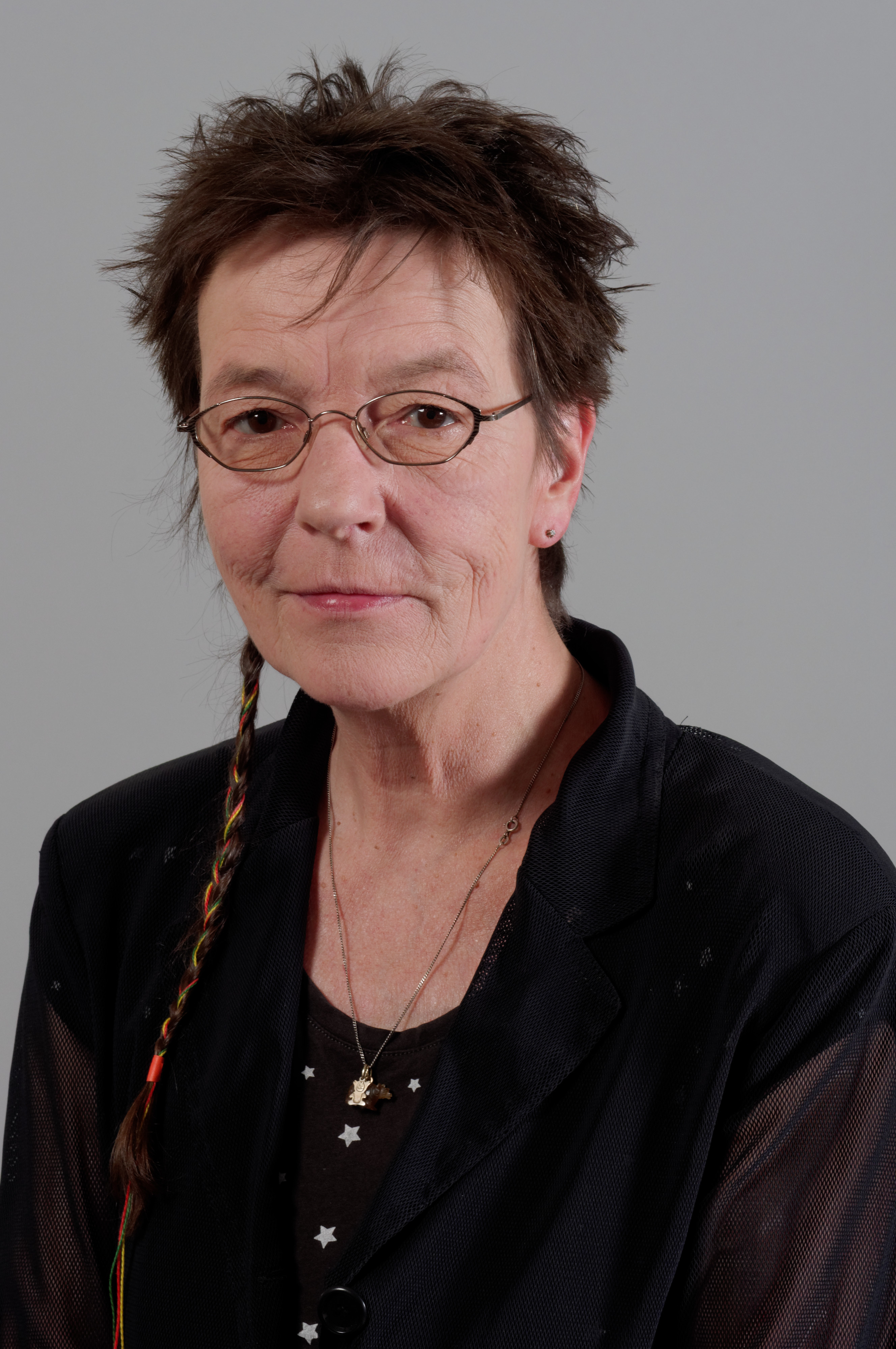 Angelika Beer, PRATEN